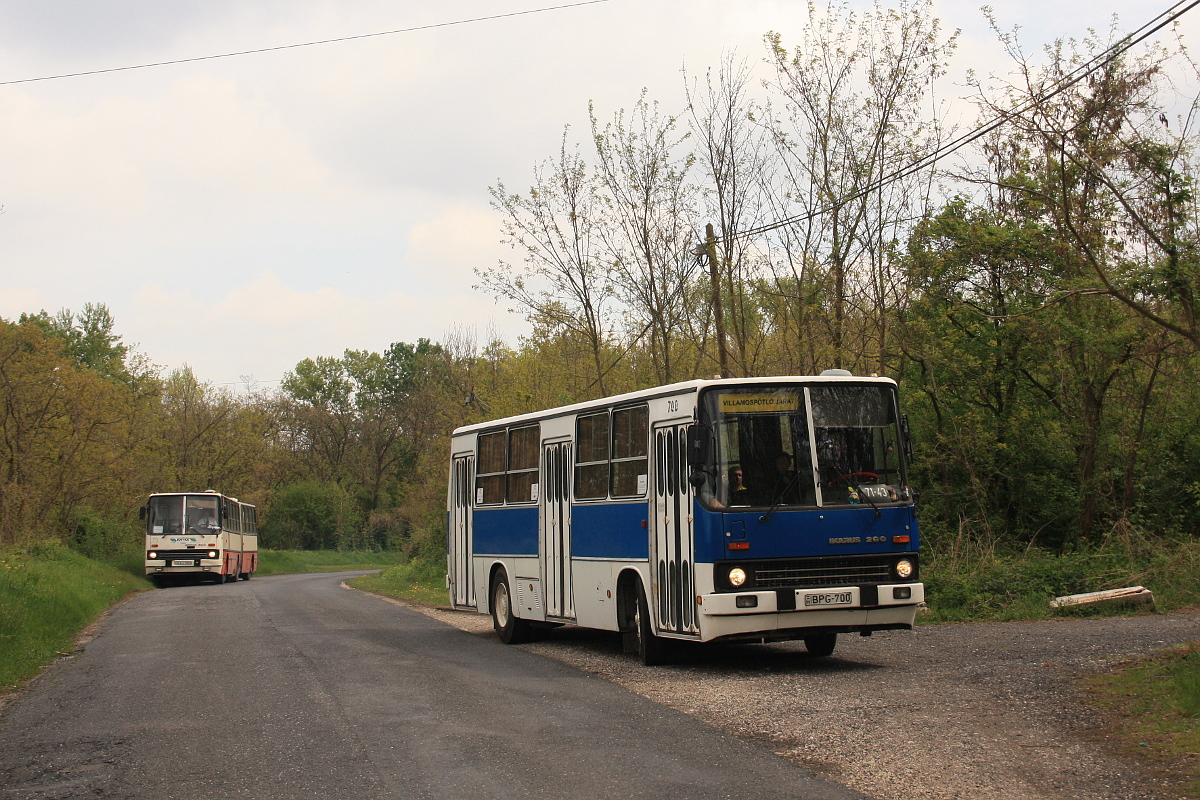 Ikarus 260.50 i Ikarus 280.17 podczas przejazdu specjalnego organizowanego z okazji 15 urodzin